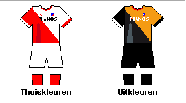 thuis en uit tenue van fc utrecht 2010/2011